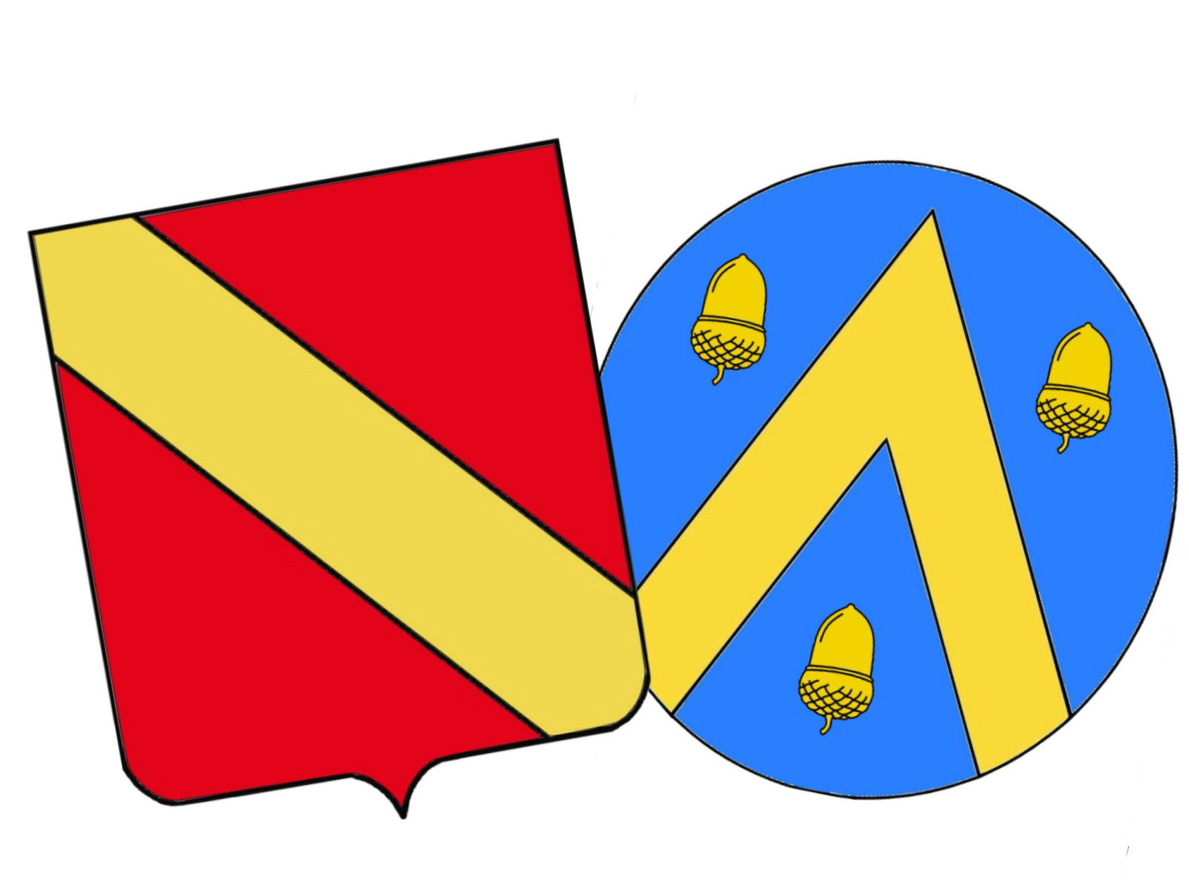 Aliiantie